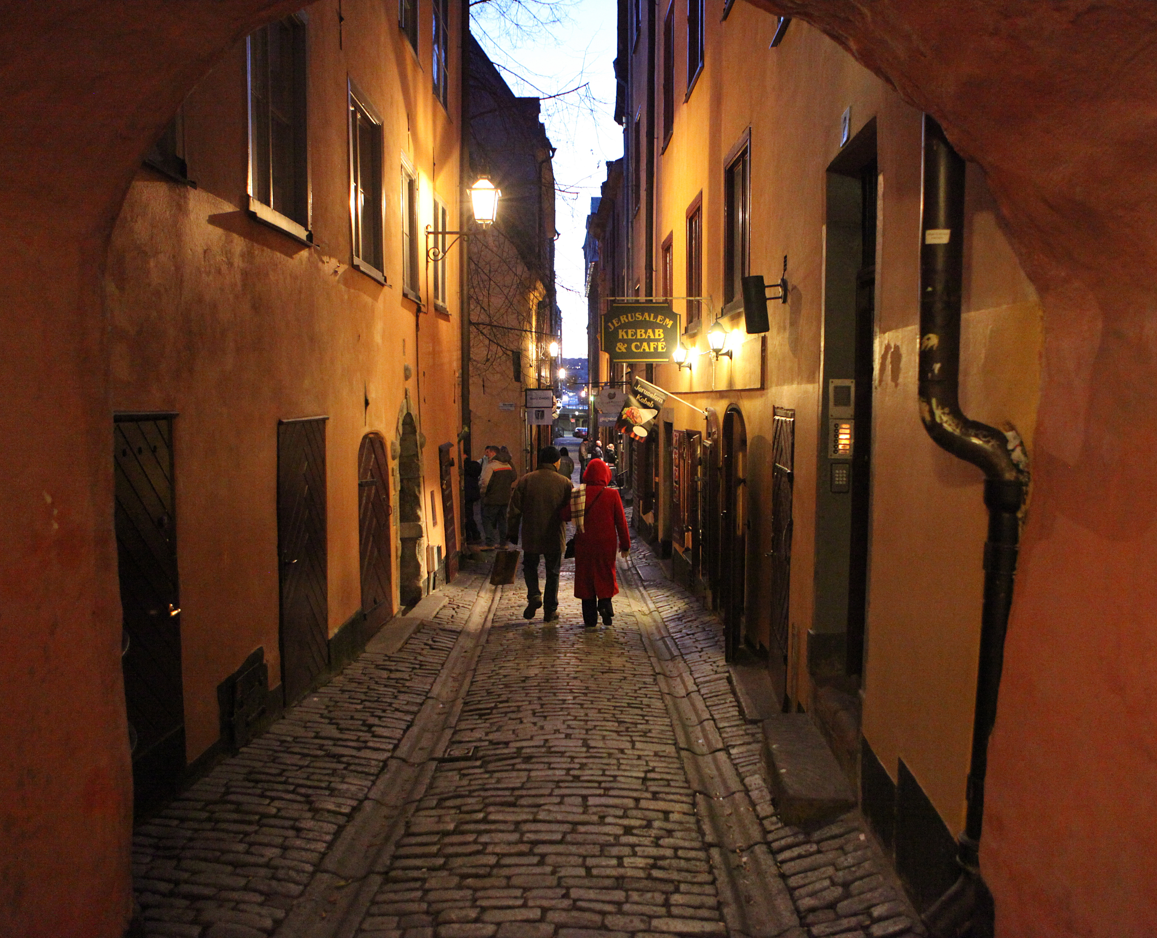 Gåsgränd, Old Town Stockholm Sweden. Blues Jam på Stampen